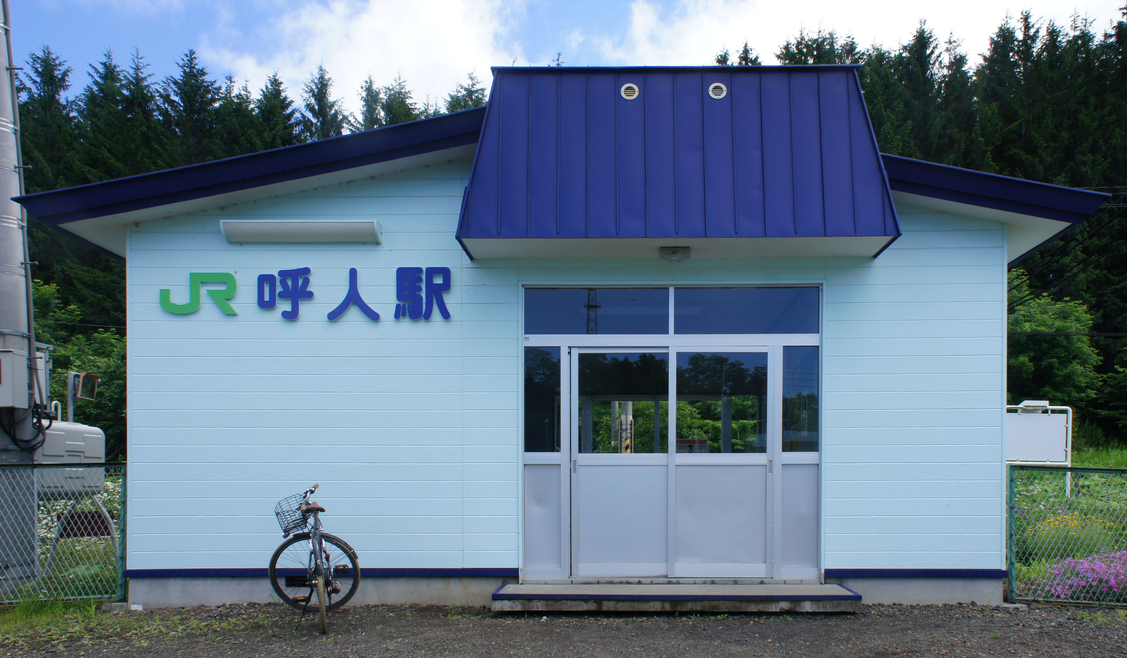 JR石北本線・呼人駅の駅舎